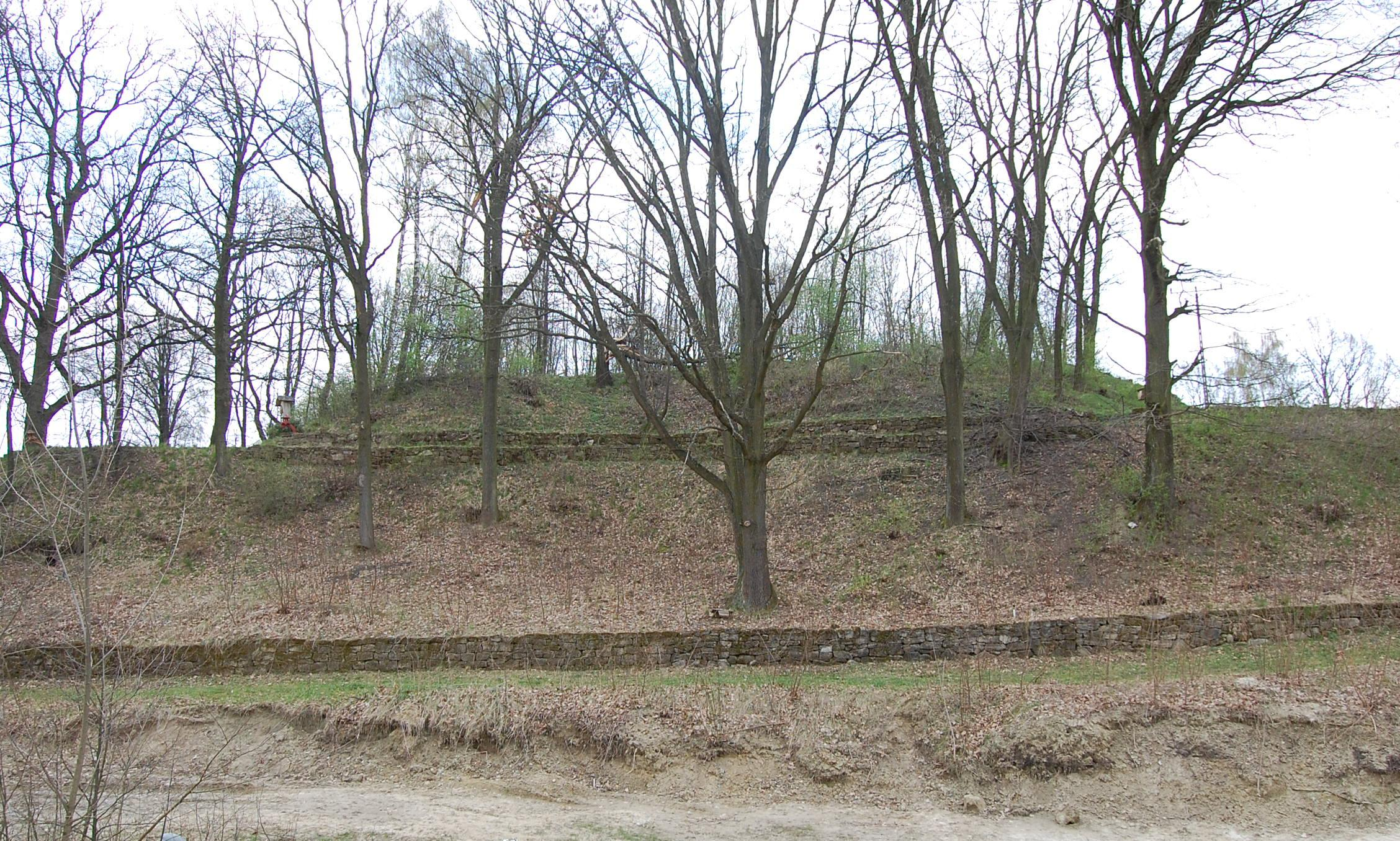 Kurhan w Motyczu